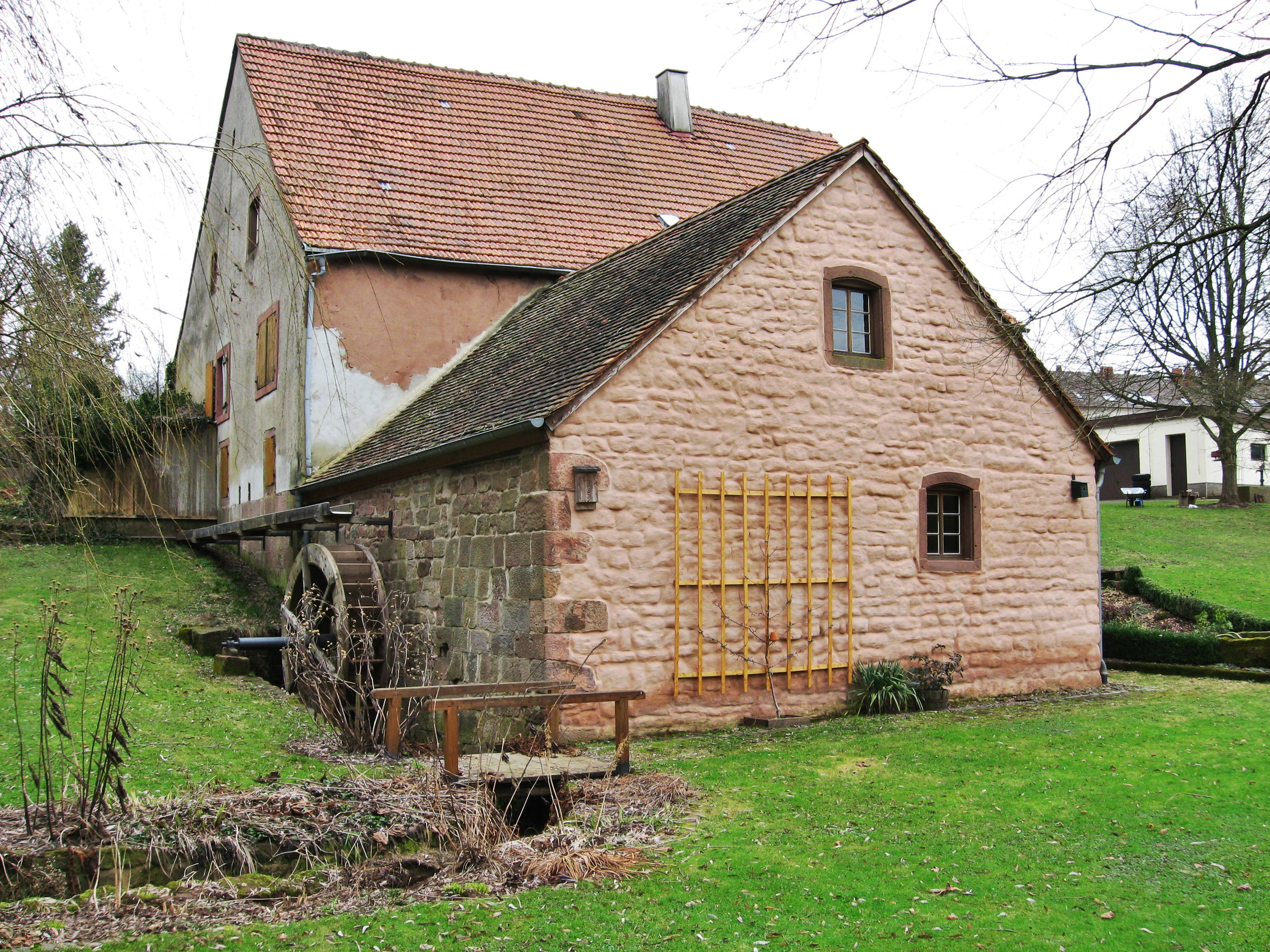 Außenansicht der Ölmühle Berschweilerl